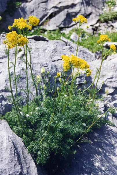 Senecio adonidifolius